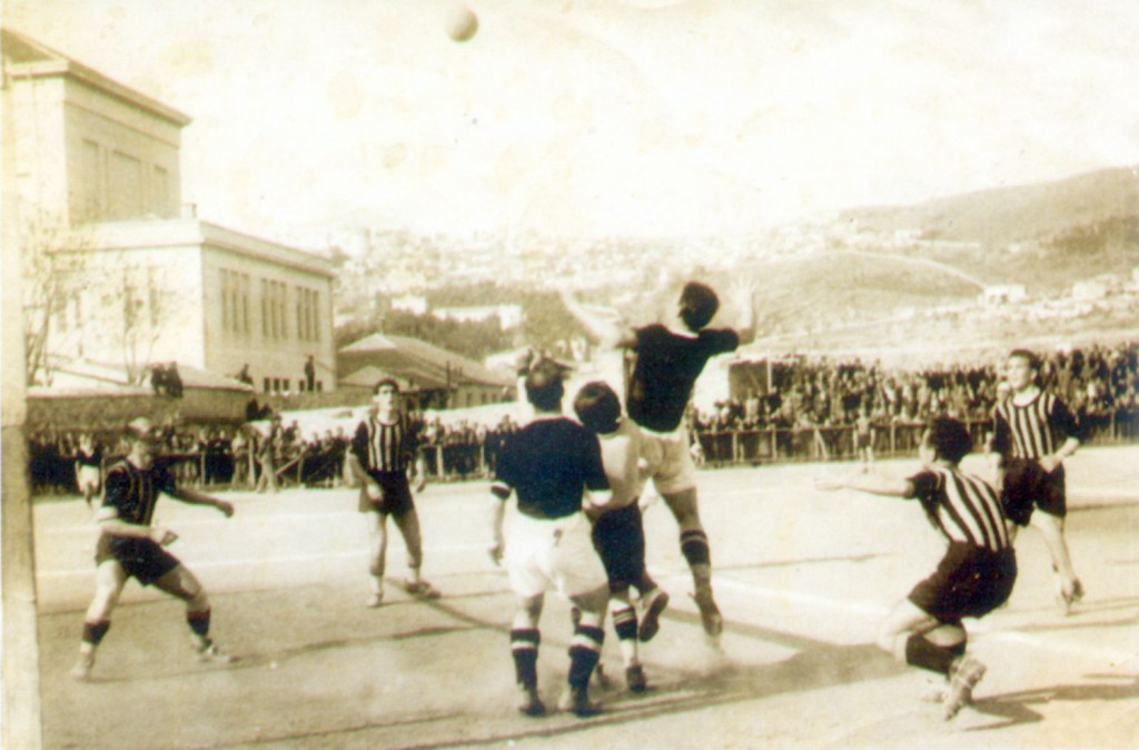 Ποδοσφαιρική αναμέτρηση στο γήπεδο του Συντριβανίου το 1930